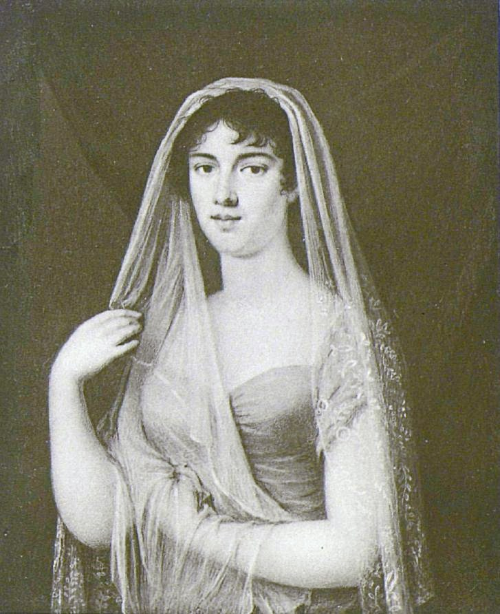 А. А. Прозоровская (в замужестве кн. Голицына)